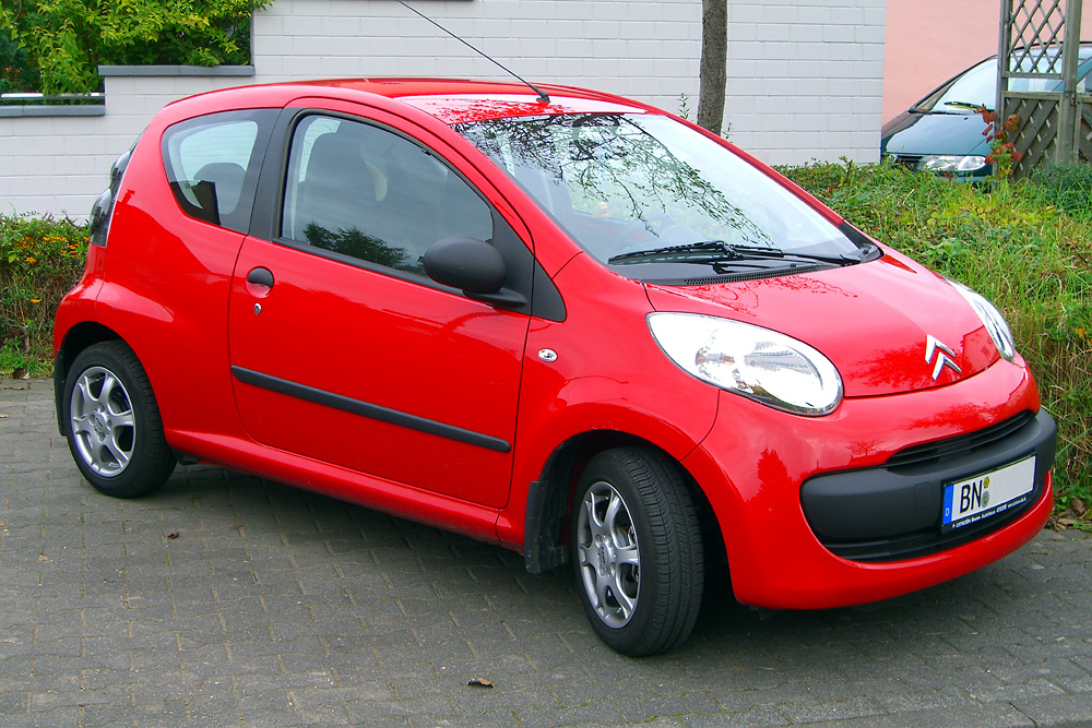 Citroen C1